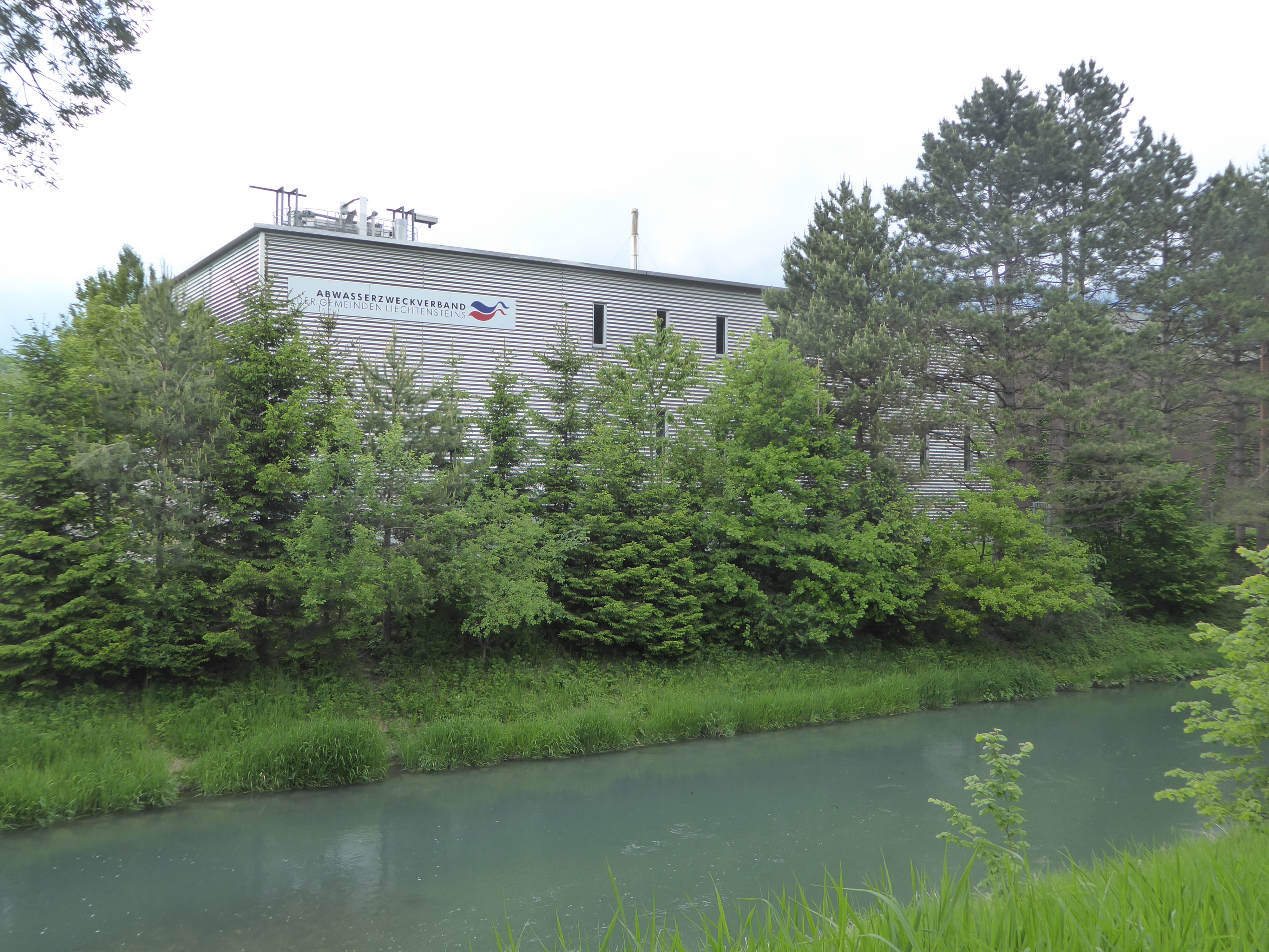 ARA Bendern des Abwasserzweckverbands Liechtenstein, vorne Binnenkanal